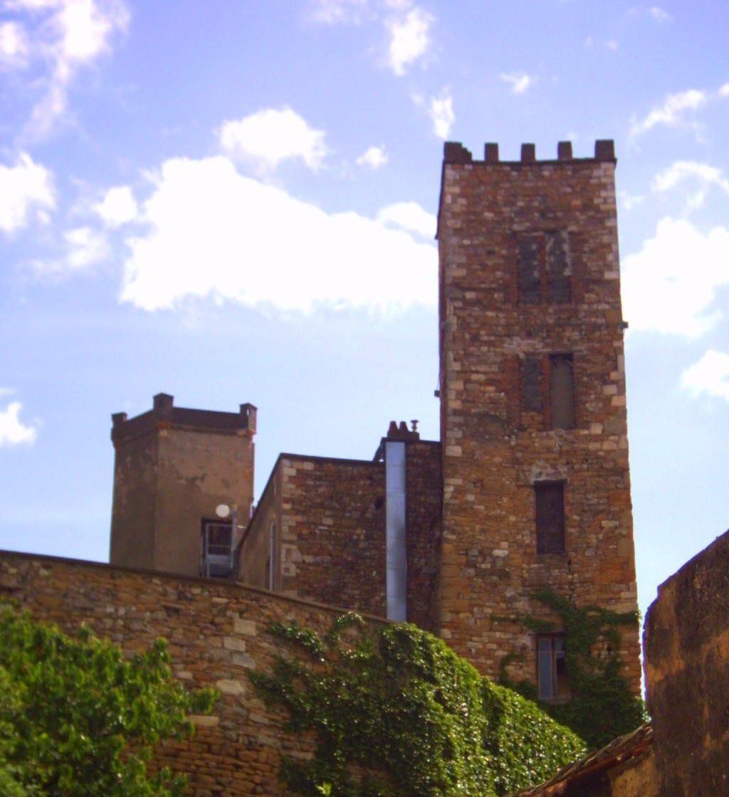 Les tours du vieux château de Vimy